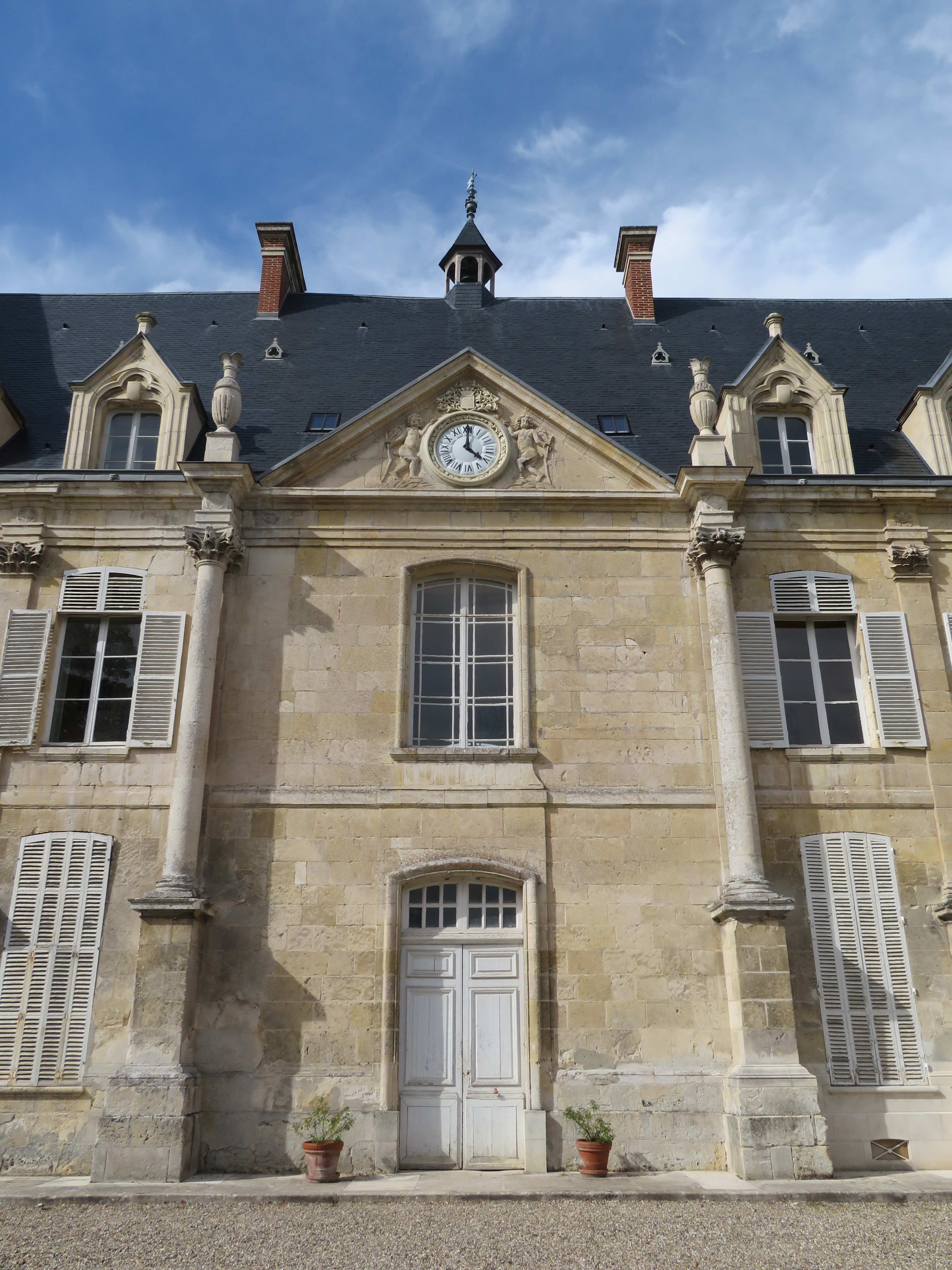 Château de Tartigny, situé sur la commune de Tartigny (Oise), à l'occasion des Journées Européennes du Patrimoine 2018. .